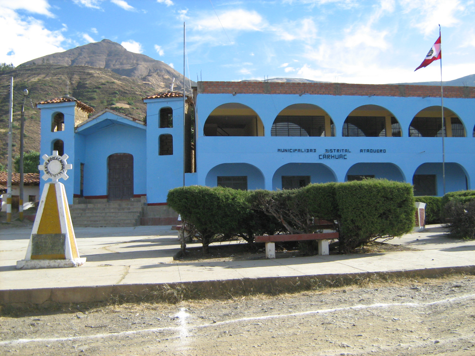 carhuac es la capital del distrito de Ataquero , situada en la provincia de Carhuaz, departamento de Ancash.